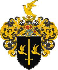 Герб рода Горловых